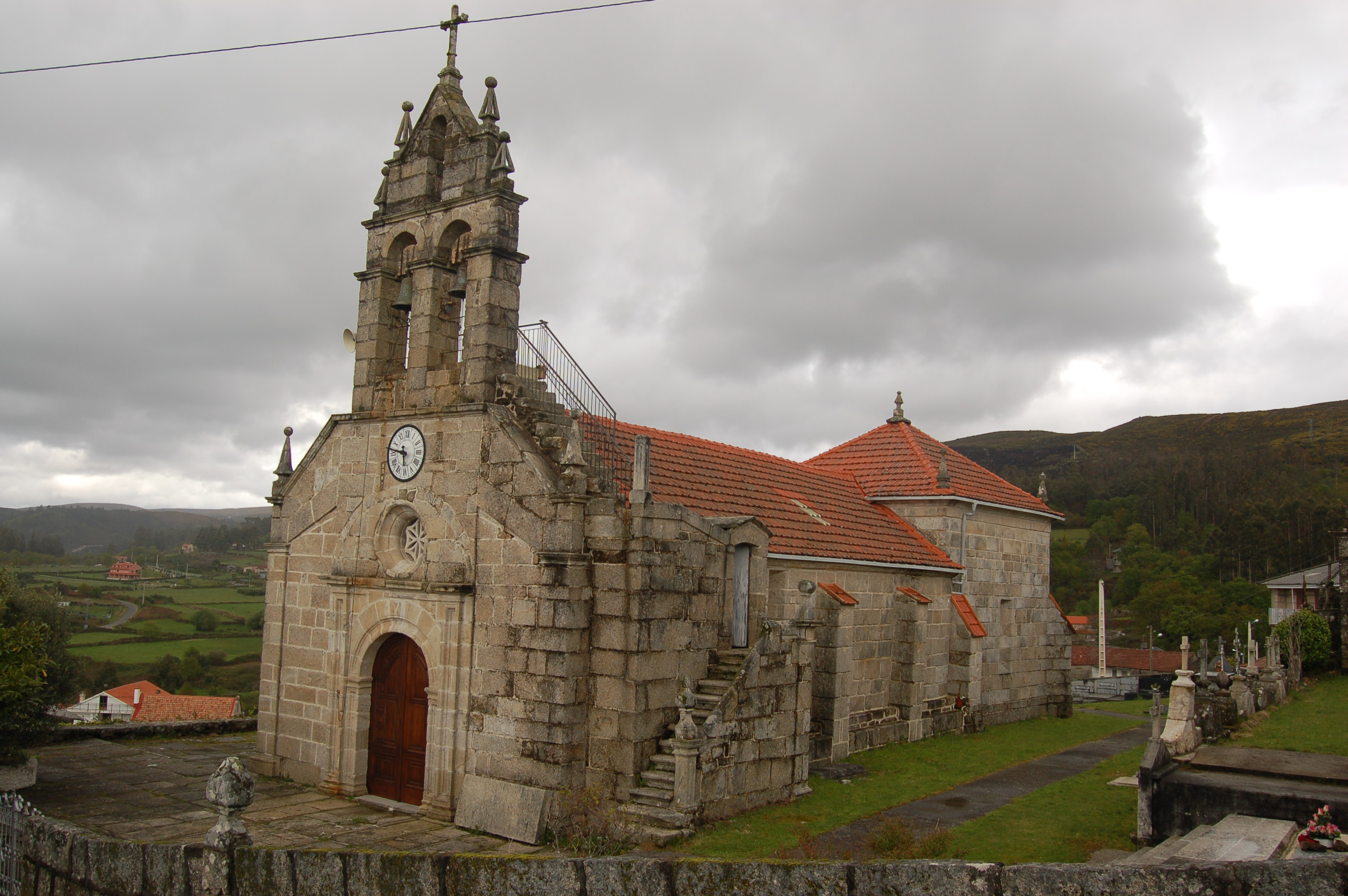 Igrexa parroquial de Santiago de Antas (A Lama) Licensing Categoría:Imaxes de Antas Categoría:Imaxes de igrexas da Lama